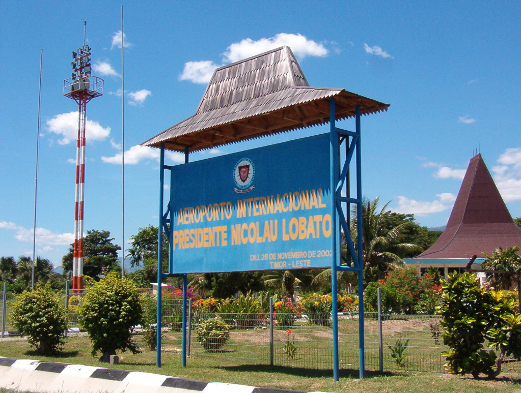 Airport Presidente Nicolau Lobato, Dili/East Timor